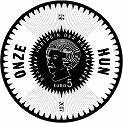 De beeldenaar van de zilveren vijf-euromunt en de gouden tien-euromunt die in 2007 worden uitgegeven ter gelegenheid van de 400ste geboortedag van Michiel de Ruyter is op de voorzijde: in een getande binnencirkel Onze Beeltenis met daaronder de waardeaanduiding «euro5», onderscheidenlijk «euro10» en het omschrift «BEATRIX KONINGIN DER NEDERLANDEN», in een getande buitencirkel links het woord «ONZE» en rechts het woord «HUN», bovenin het initiaal logo van de ontwerper Martijn Engelbregt gevormd door de letters «EGBG» en onderin het jaartal 2007; De woorden op voor- en keerzijde vormen samen de tekst «ONZE PAREL HUN SCHRIK»